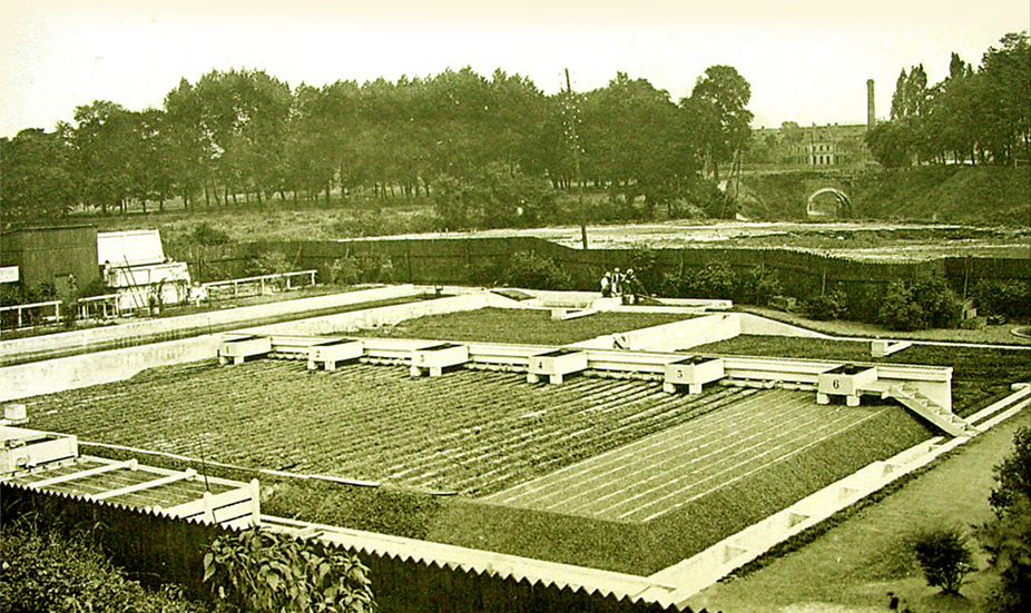 Expériences d'épuration de l'eau par lagunage. Des plantes sont testées pour leur capacité à épurer l'eau, à Lille, vers 1900-1910, par le Pr Calmette.